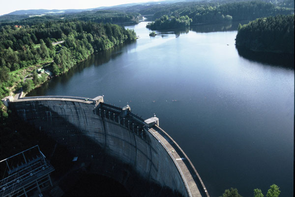 Die Staumauer des Kraftwerks Ottenstein und der dahinterliegende Stausee